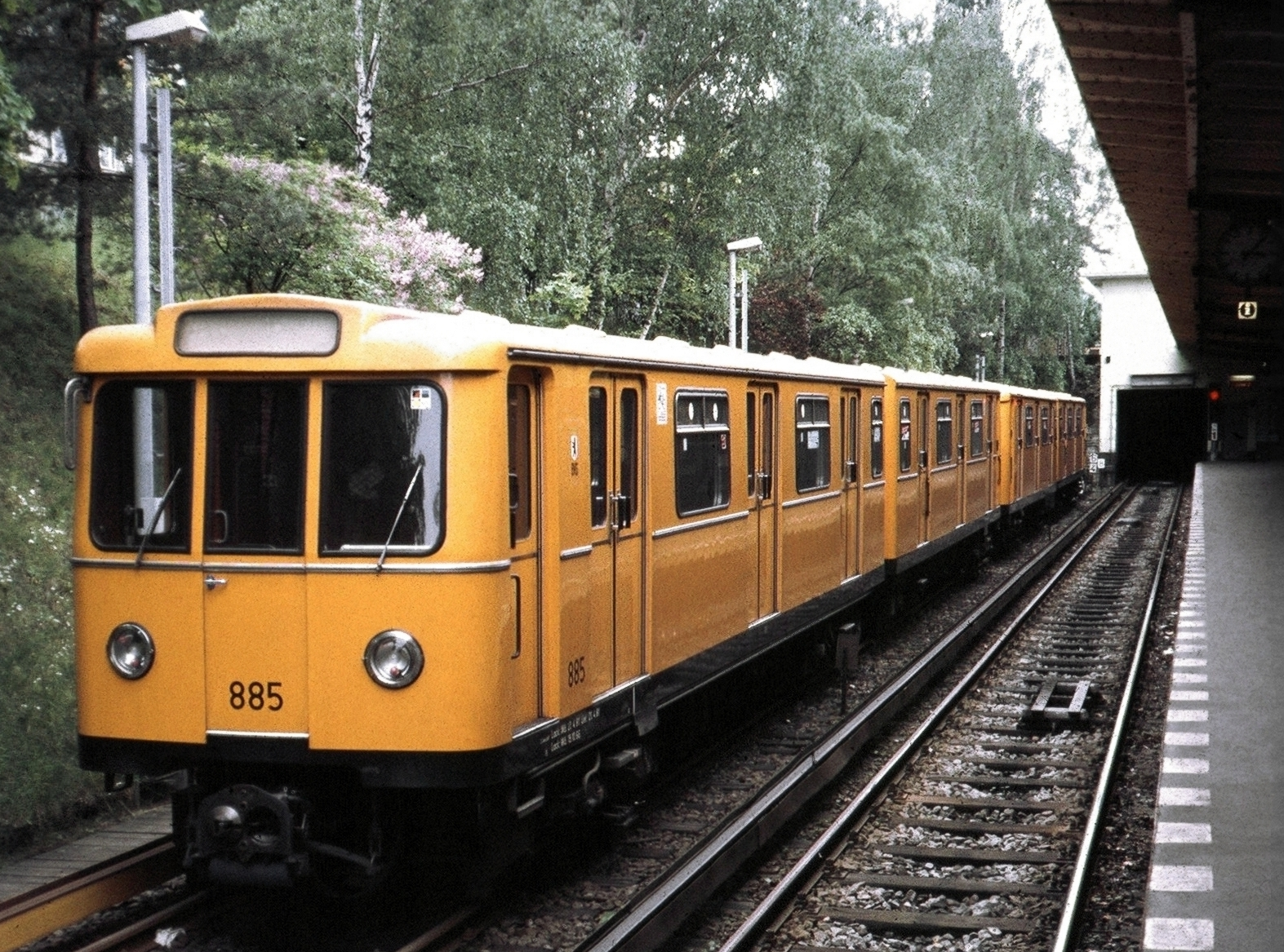 A3L U-Bahnhof Krumme Lanke (Berlin)